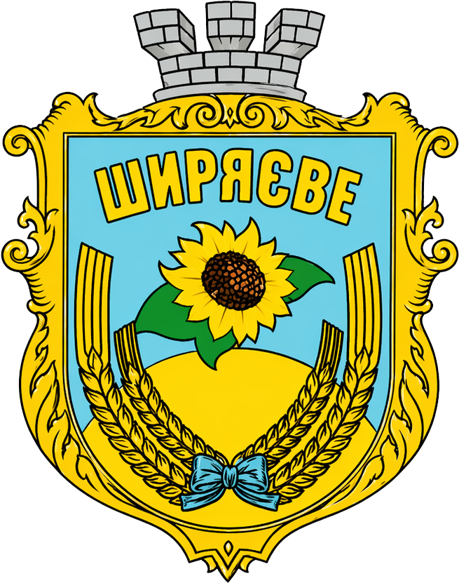 Герб смт Ширяєве, Одеська область